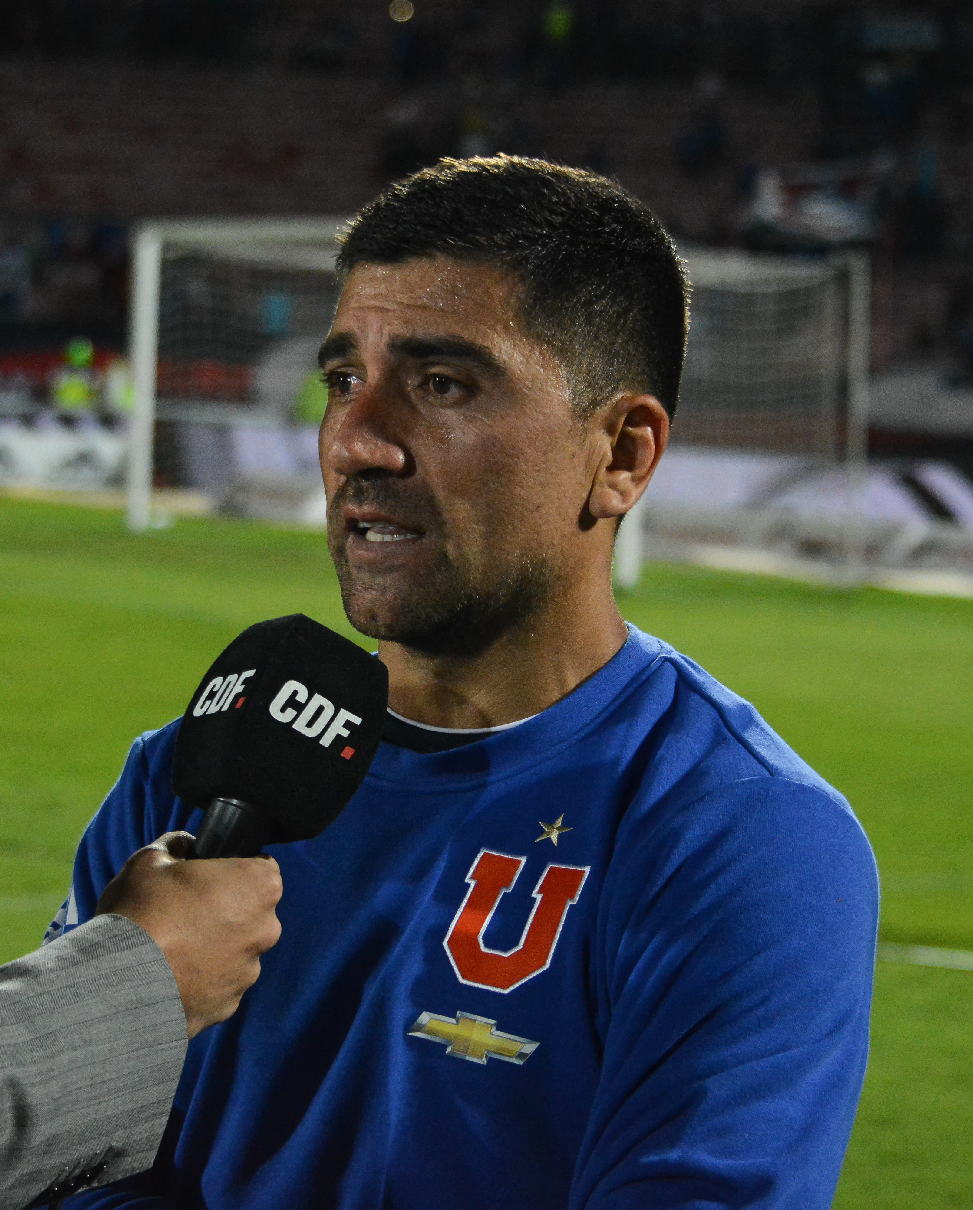 David Pizarro, Universidad de Chile v Deportes Antofagasta, Estadio Nacional, Santiago, Chile.